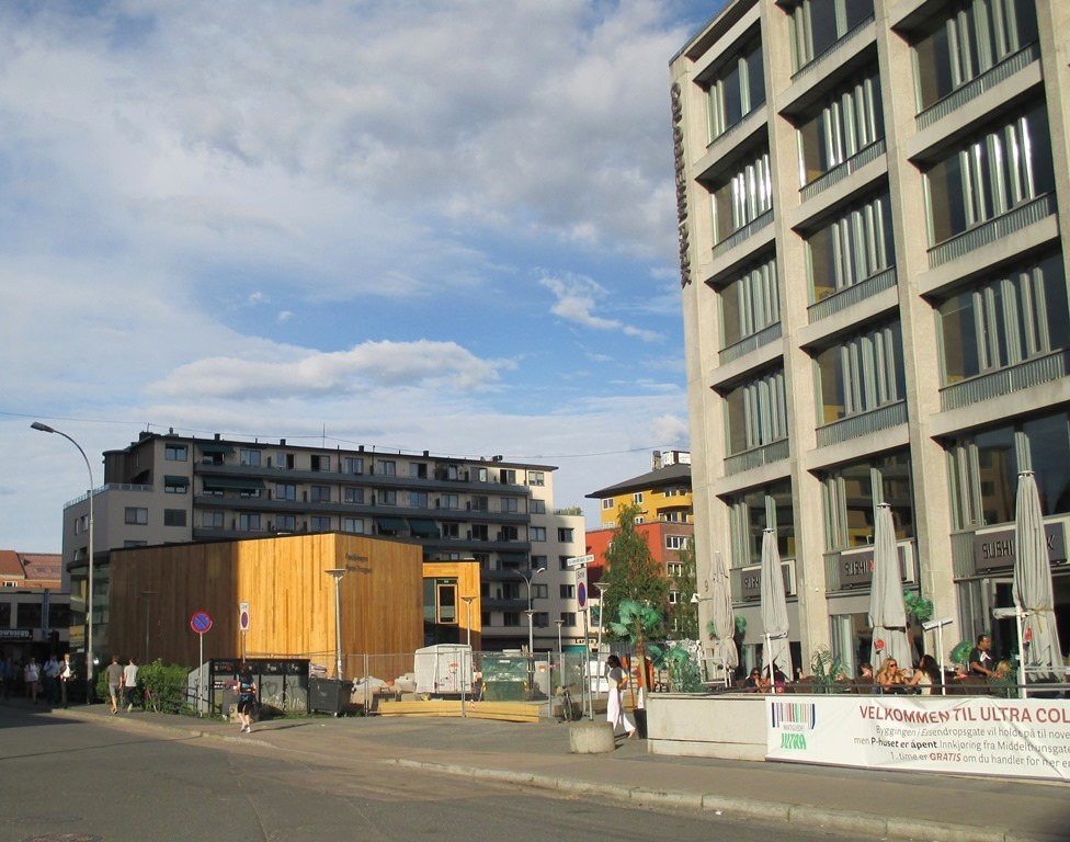 Essendrops gate ved nr. 9 (Colosseum Park), i krysset med Fridtjof Nansens vei. Mye av gaten mer preget av veiarbeid i 2014.